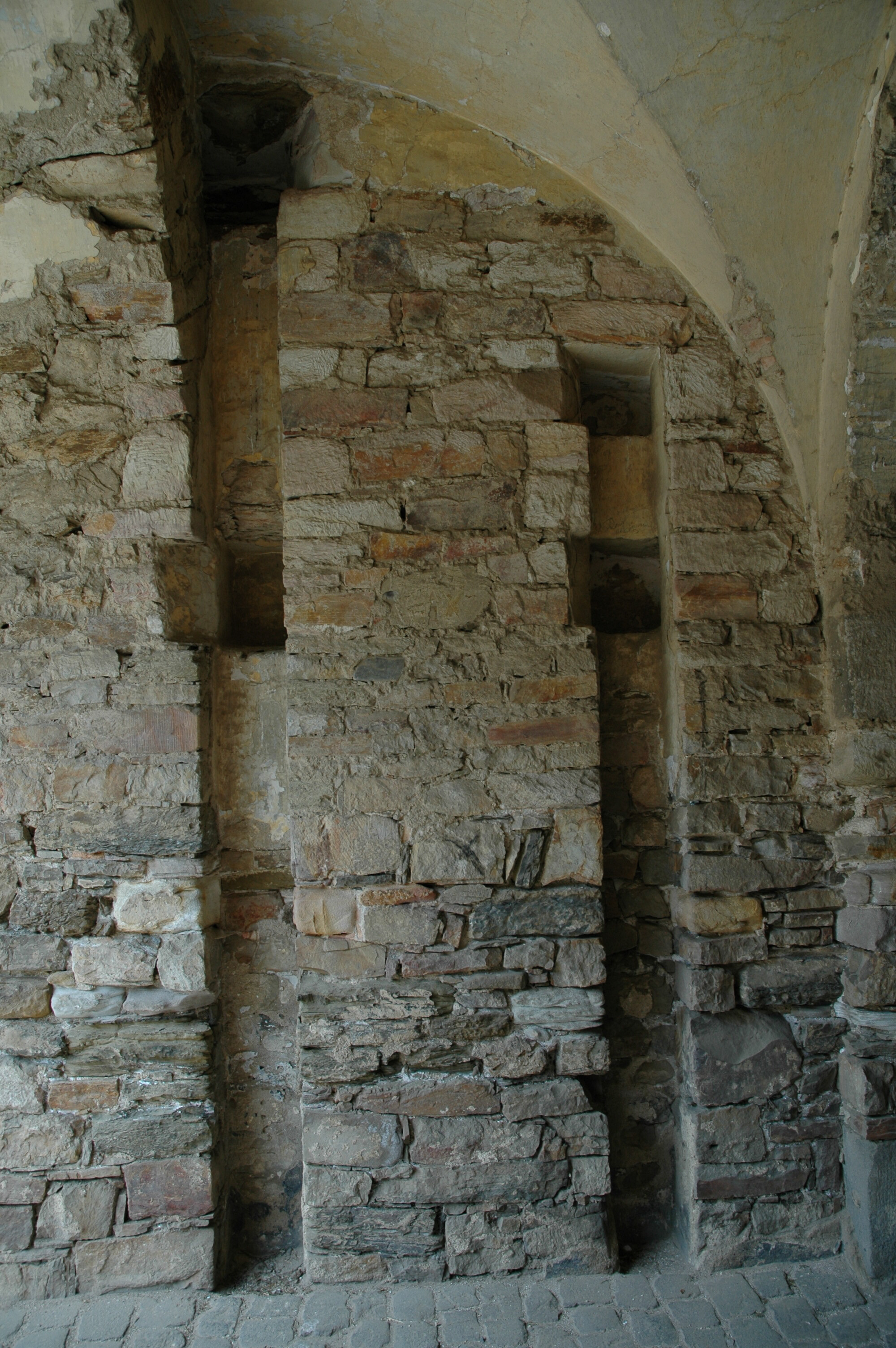 Versatzfalze Feste Ehrenbreitstein